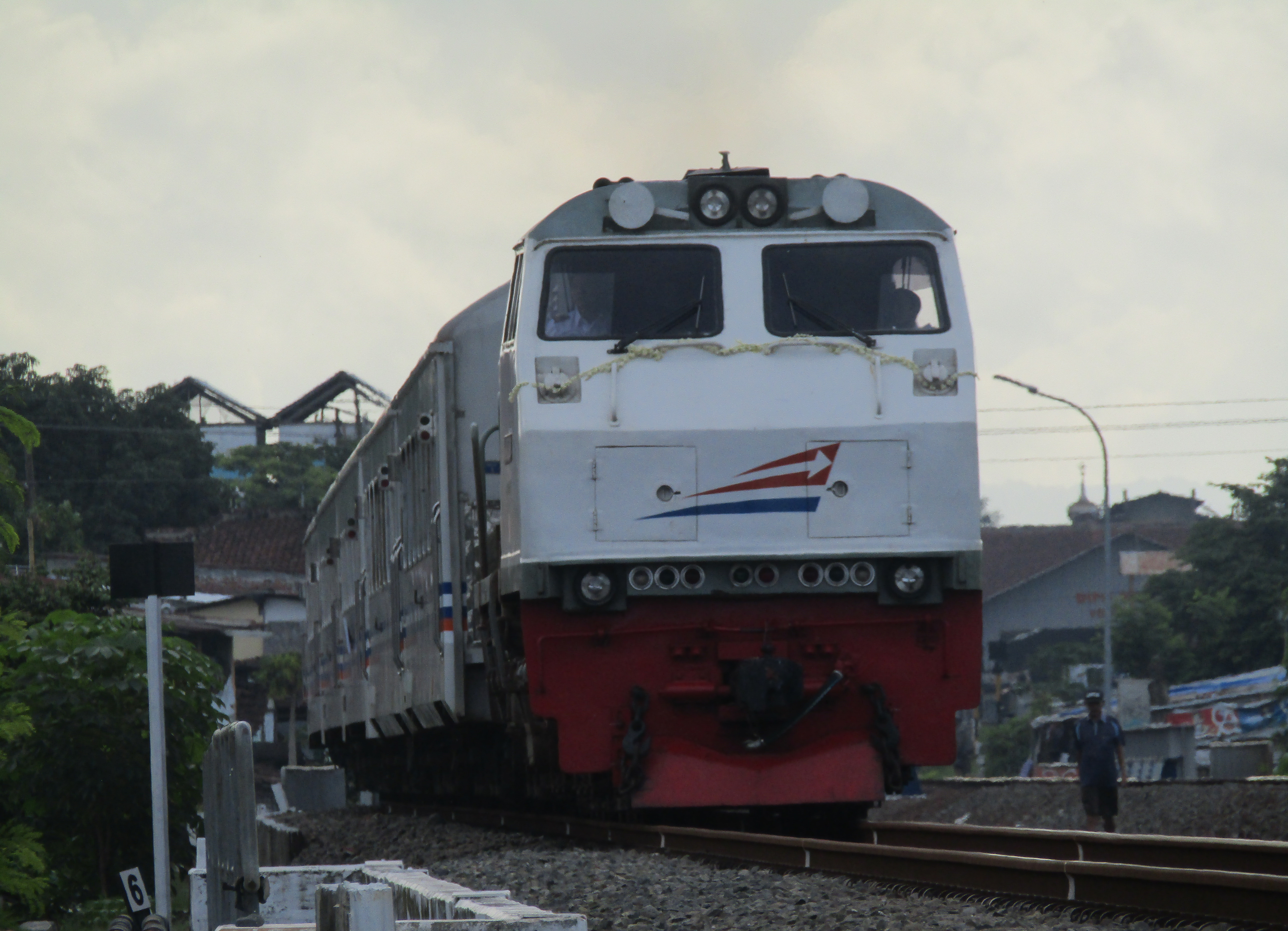 Keberangkatan KA Joglosemarkerto dari Yogyakarta pada hari pertama perjalanannya